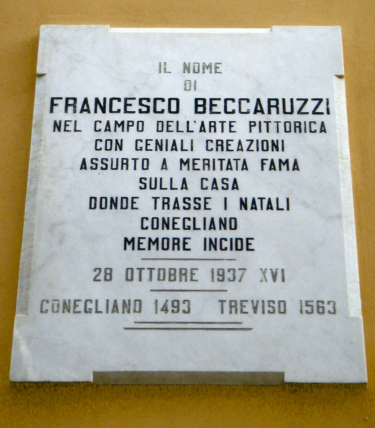 Conegliano: lapide commemorativa di Francesco Beccaruzzi, sulla facciata della sua casa natale, attualmente sede degli Alpini.